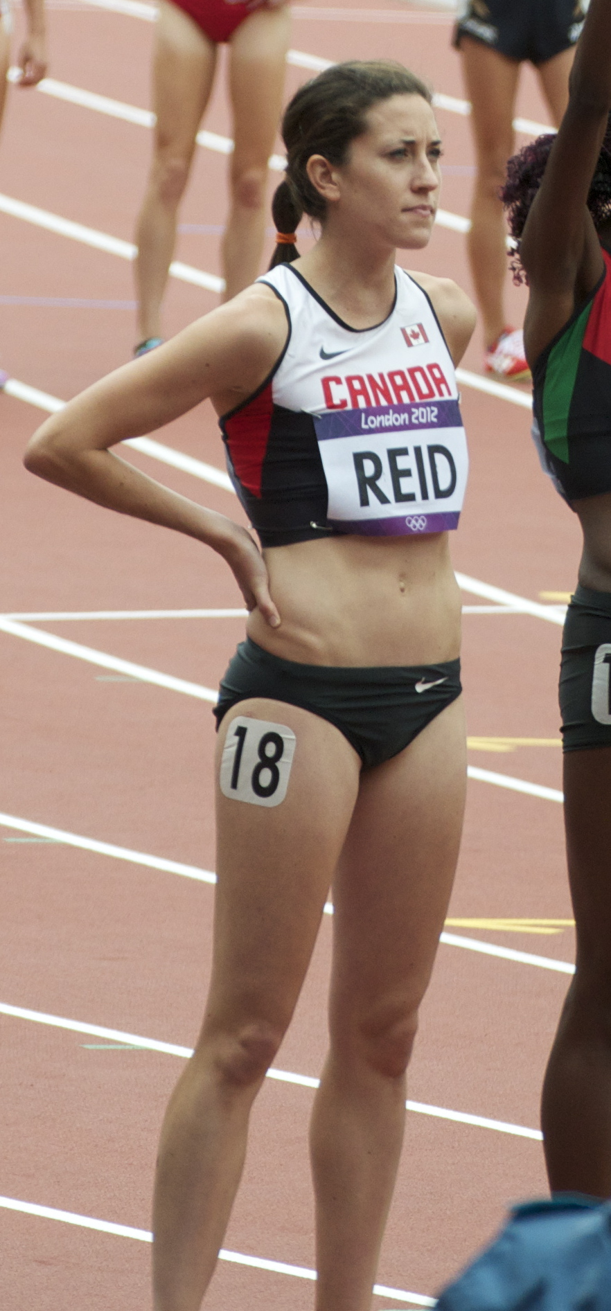 Women's 5000m